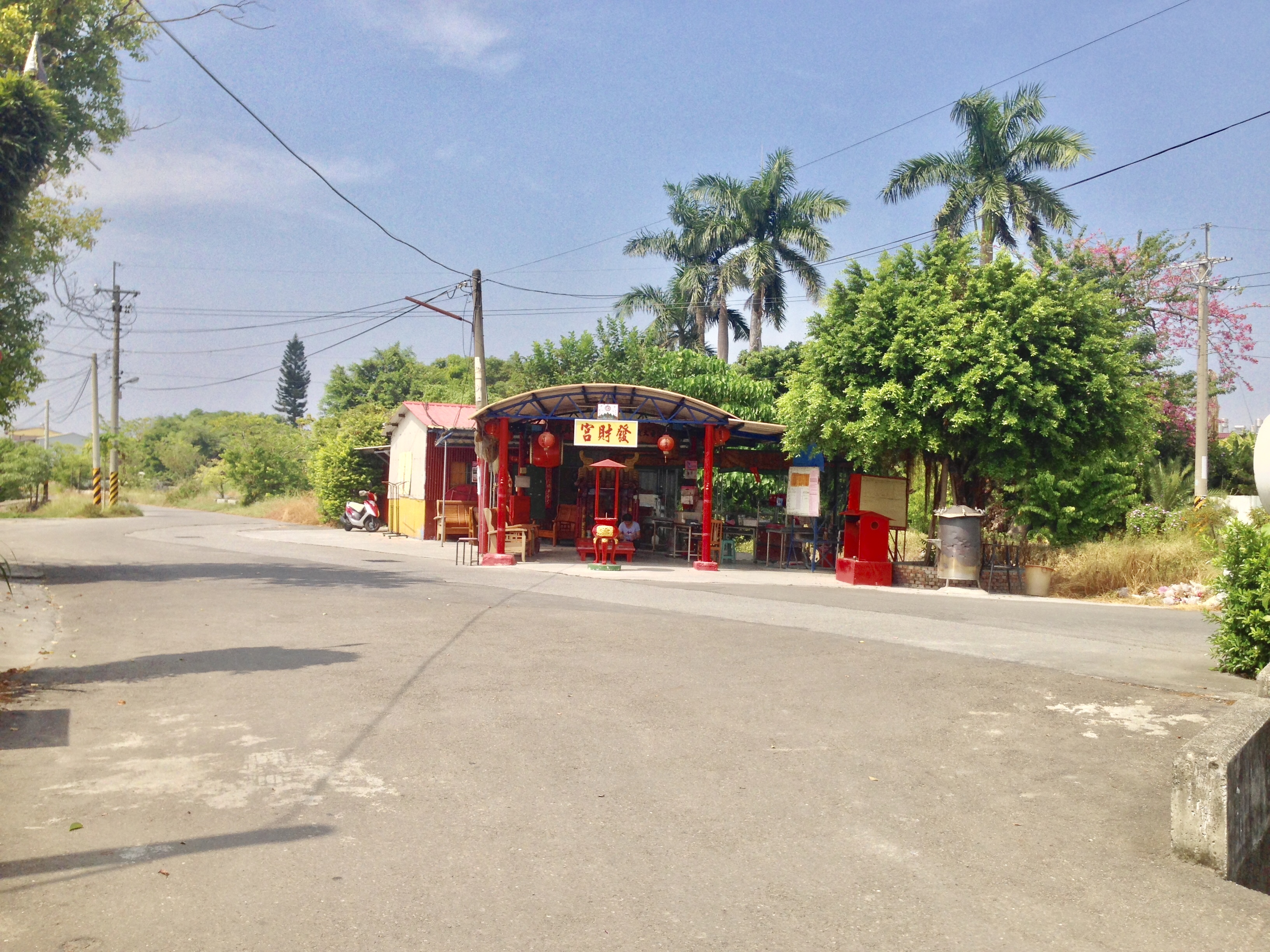 中文（台灣）: 天蓬元帥發財宮遠景